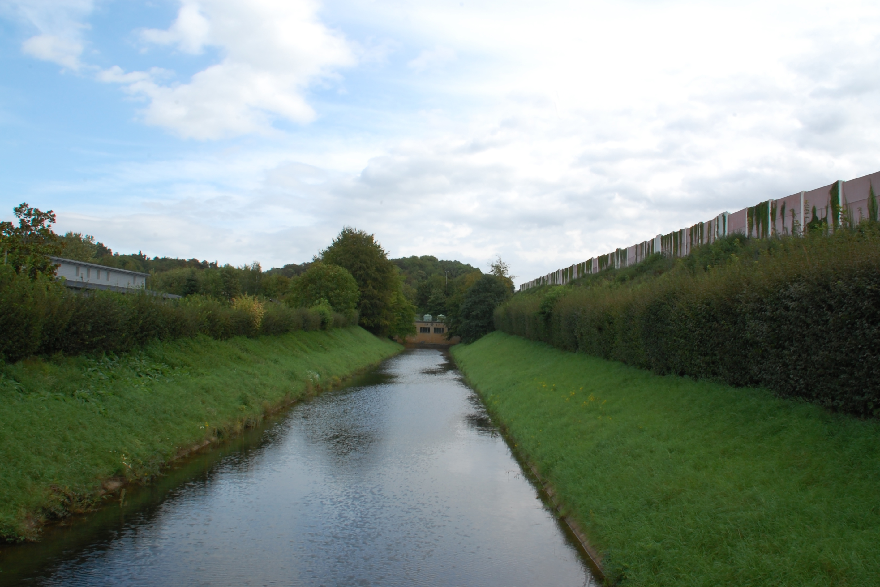 Kanal in Horrem, parallel der Autobahn A 4 mit Lärmschutzwand in Horrem, Kerpen